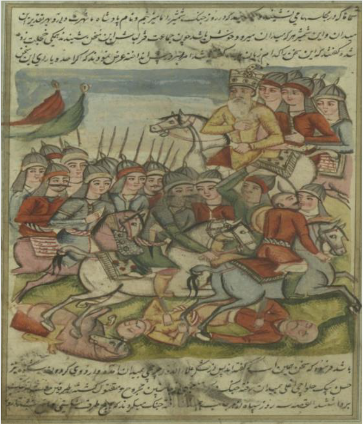 Şah İsmail’in Dulkadirliler’e karşı savaşı (“Târîh-i ‘Âlemârâ-yi Şâh İsma‘îl”in yazmalarından birine meçhul bir ressam tarafından çekilmiş resim; Tahran, İslâmî Şûrâ Meclisi’nin Kütüphanesi, No. 635, v.68a)